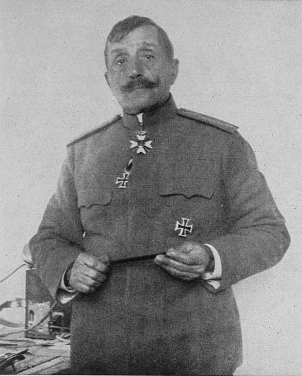 Командващият българската 3-та армия генерал Стефан Тошев.